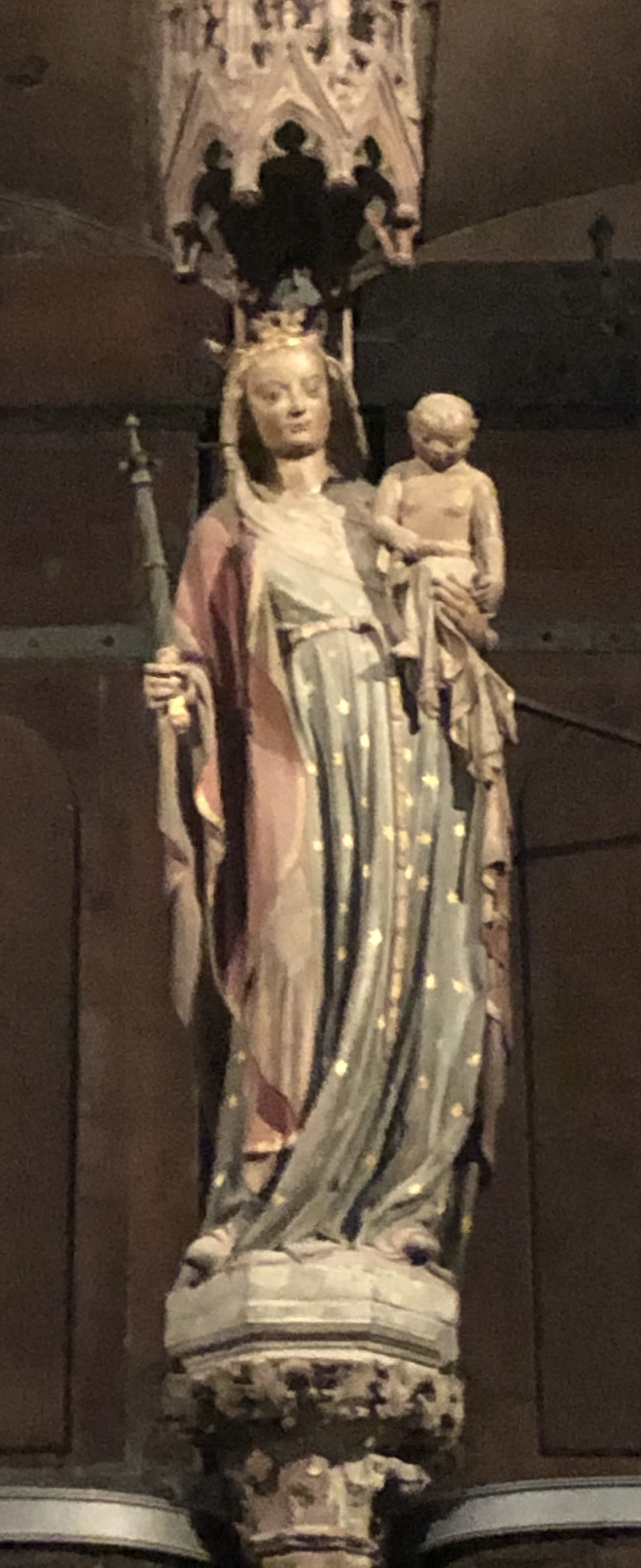 Sternenkleidmadonna 1300 im Münster in Freiburg, Hauptportal